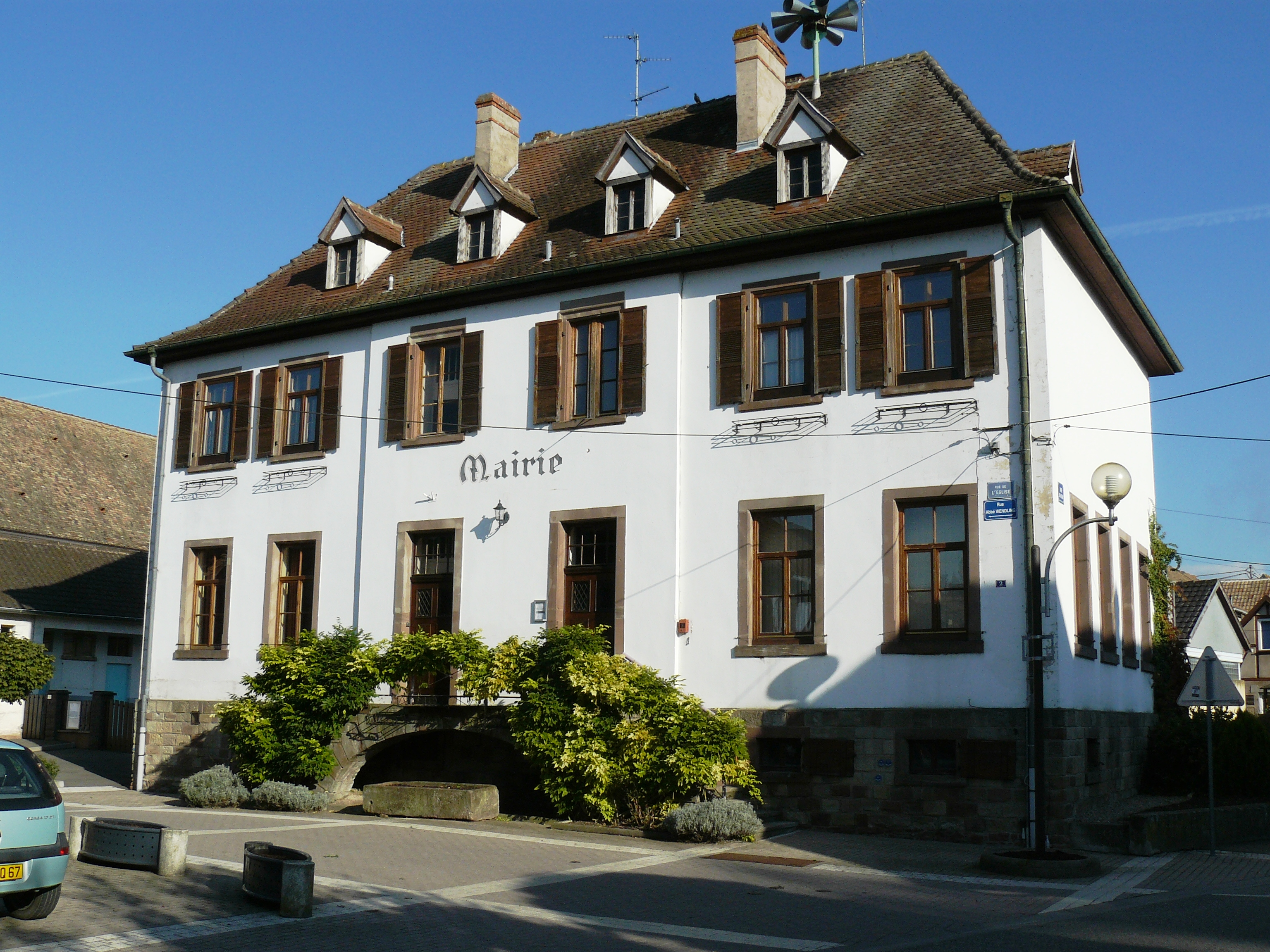 Mairie de Diebolsheim